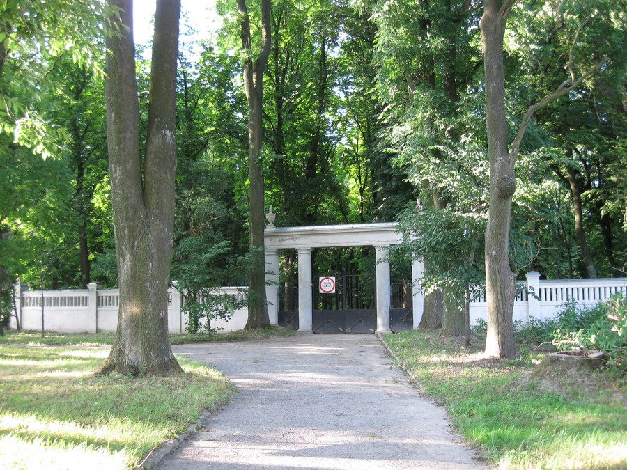 Czesławice - ogrodzenie z bramą w zespole pałacowym